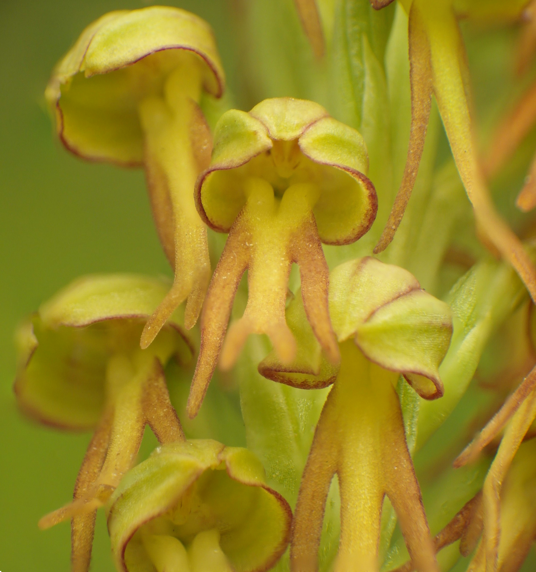 Puppenorchis (Aceras anthropophorum), auch Ballerina oder Ohnhorn, am Hammelsberg (Eisenach)